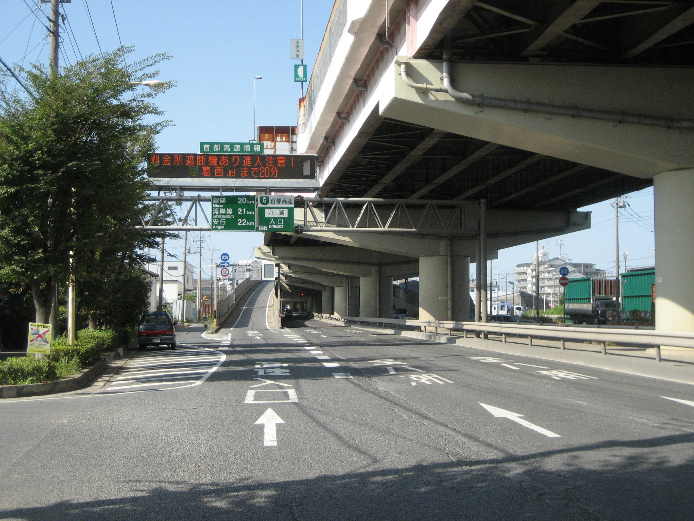 八潮IC東京方面入口